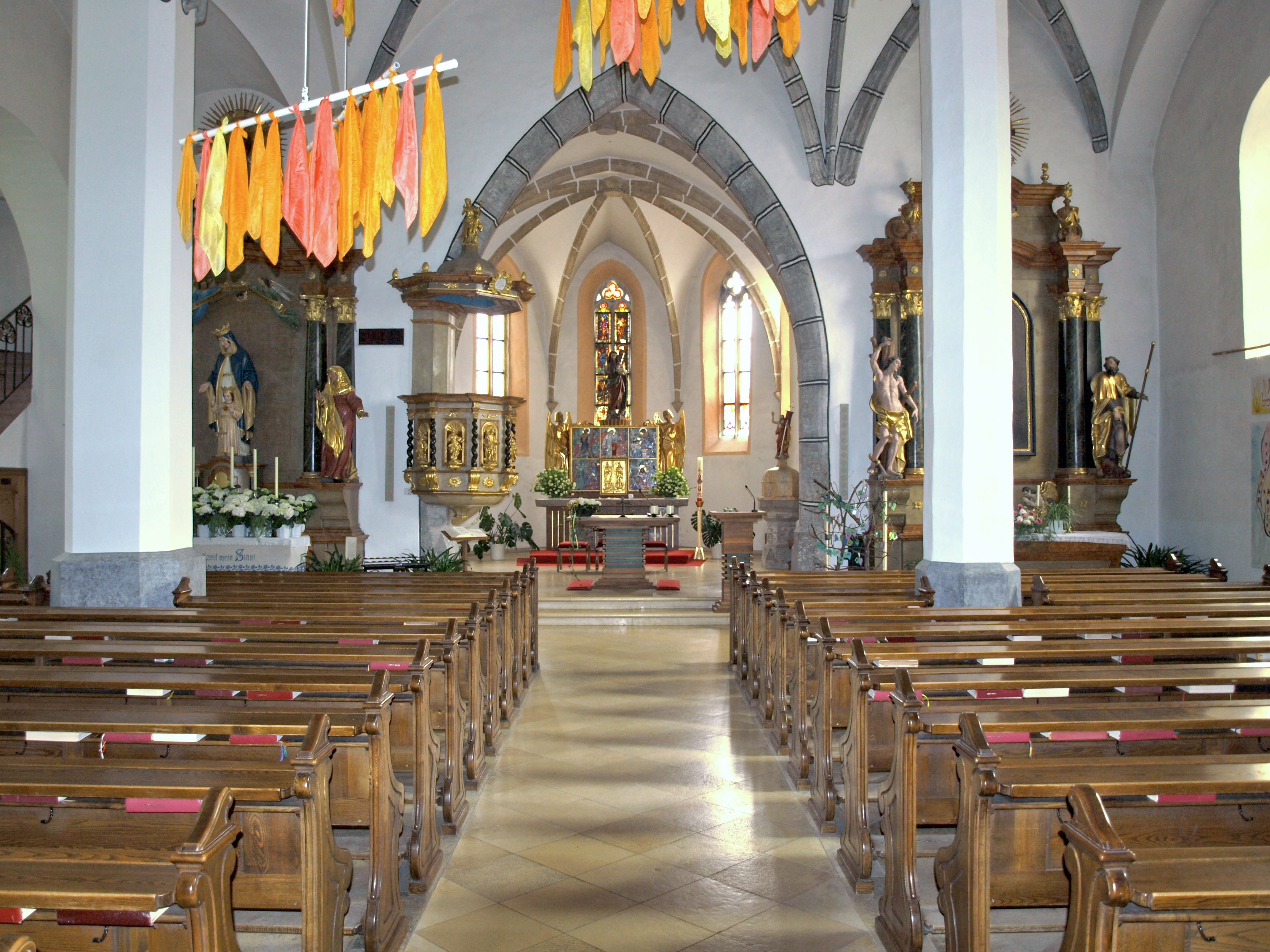 Kath. Pfarrkirche hl. Johannes der Täufer